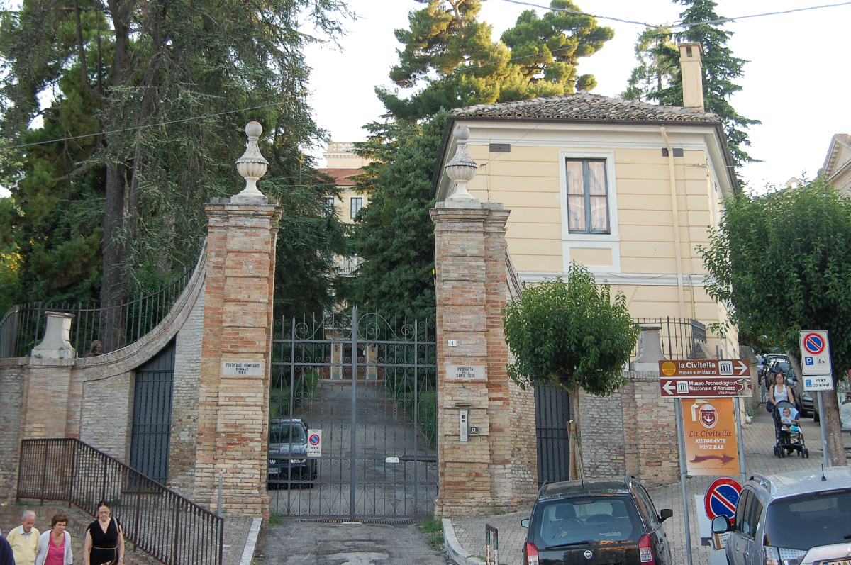 Chieti City 2011